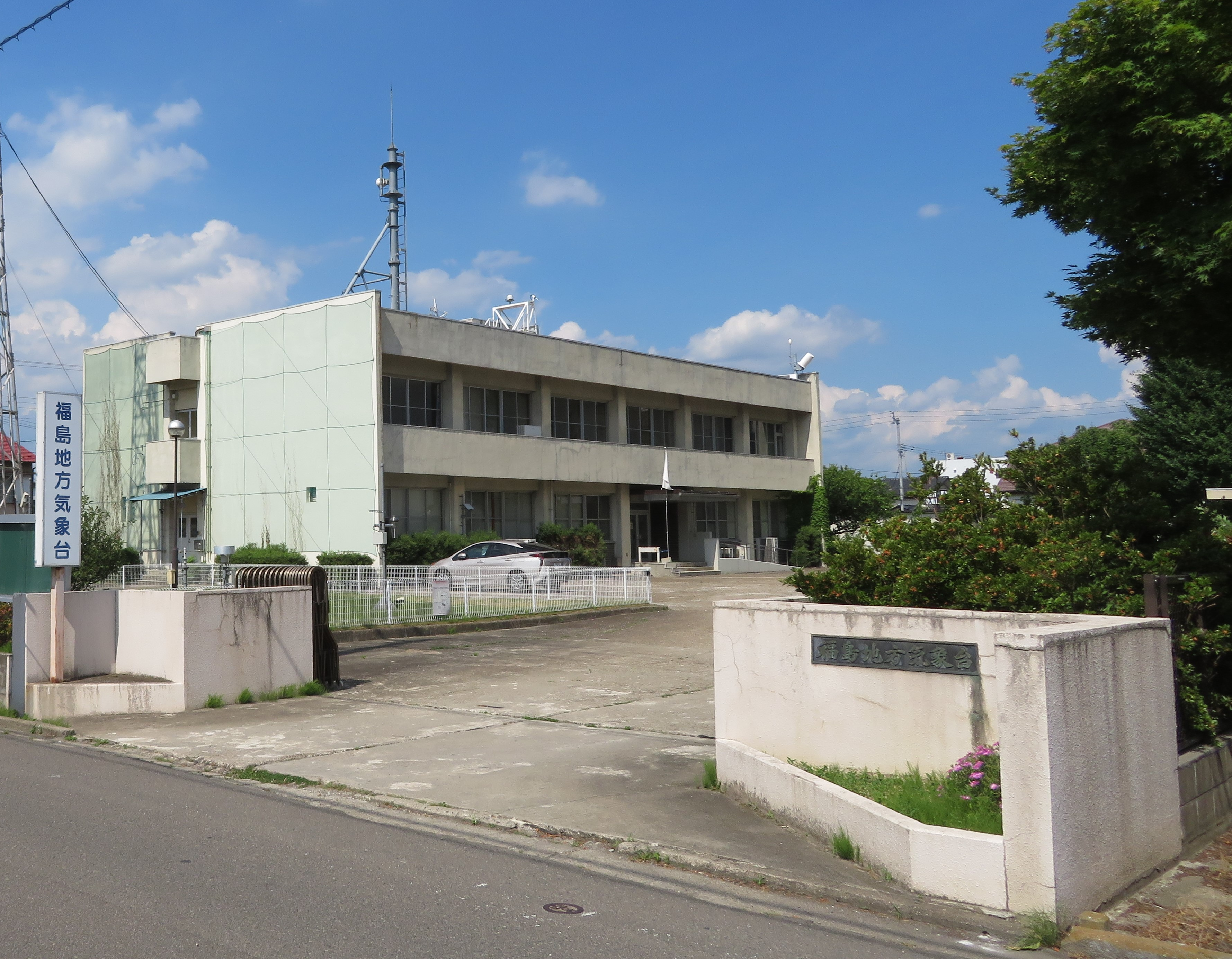 福島地方気象台庁舎 Canon PowerShot SX720 HS